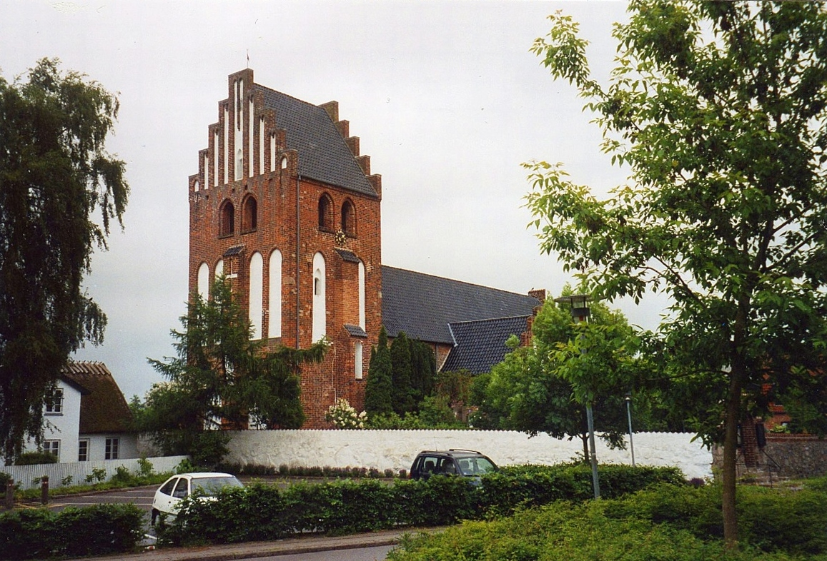 Birkerød Kirke, Birkerød Sogn, Rudersdal Kommune